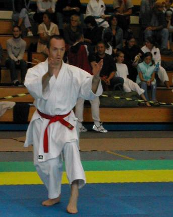 Auteur : Franck Duboisse